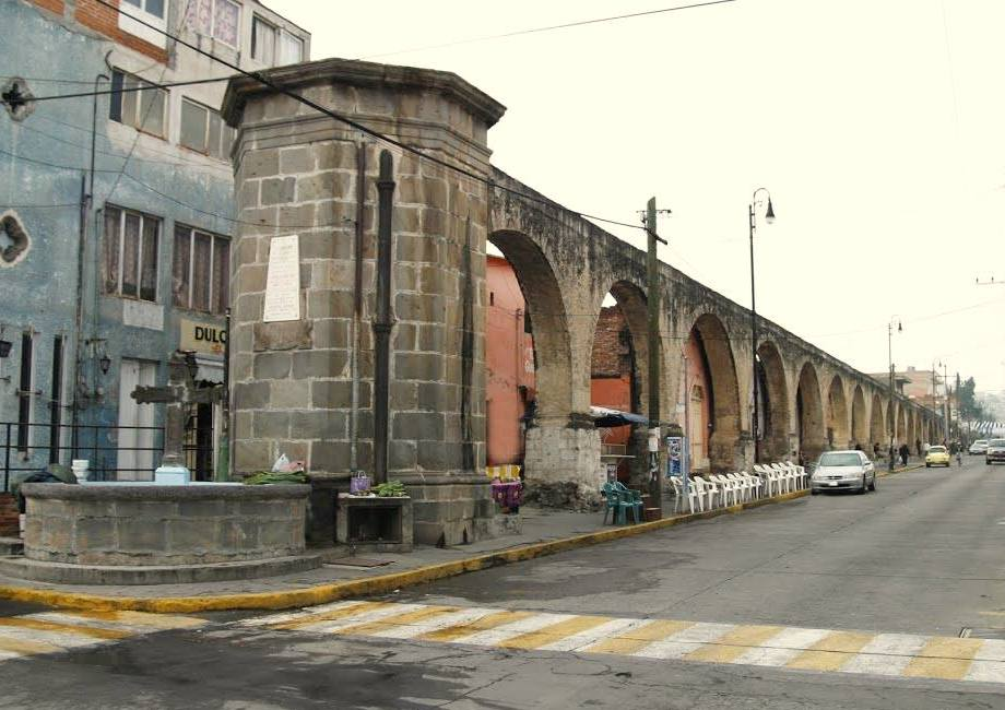 Vista del acueducto de Acámbaro en 2014